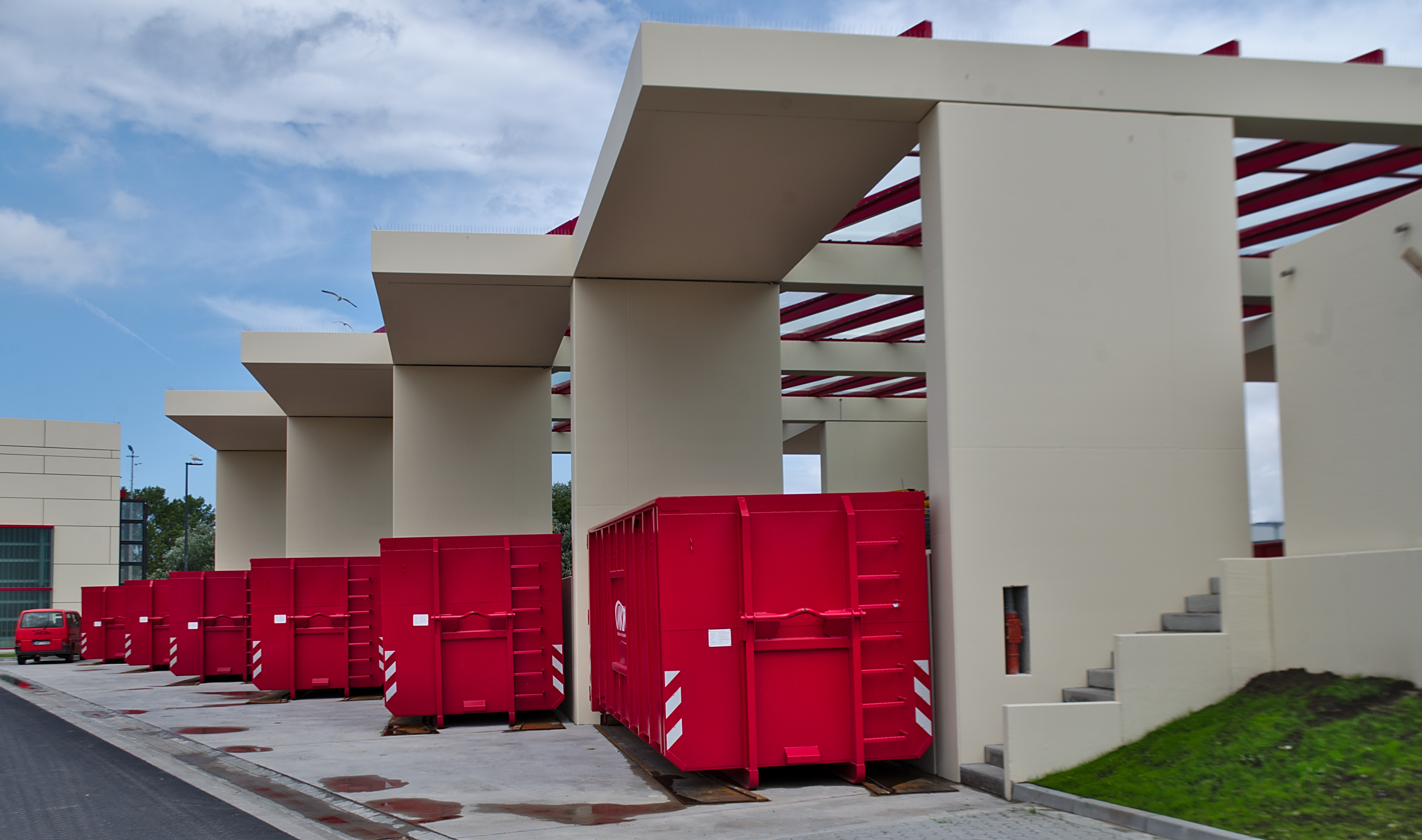 Wertstoffsammelstelle auf Norderney.